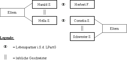 Skizze zur Erläuterung der Schwägerschaft im Falle eingetragener Lebenspartnerschaft. Das Original ist 510×250px groß.